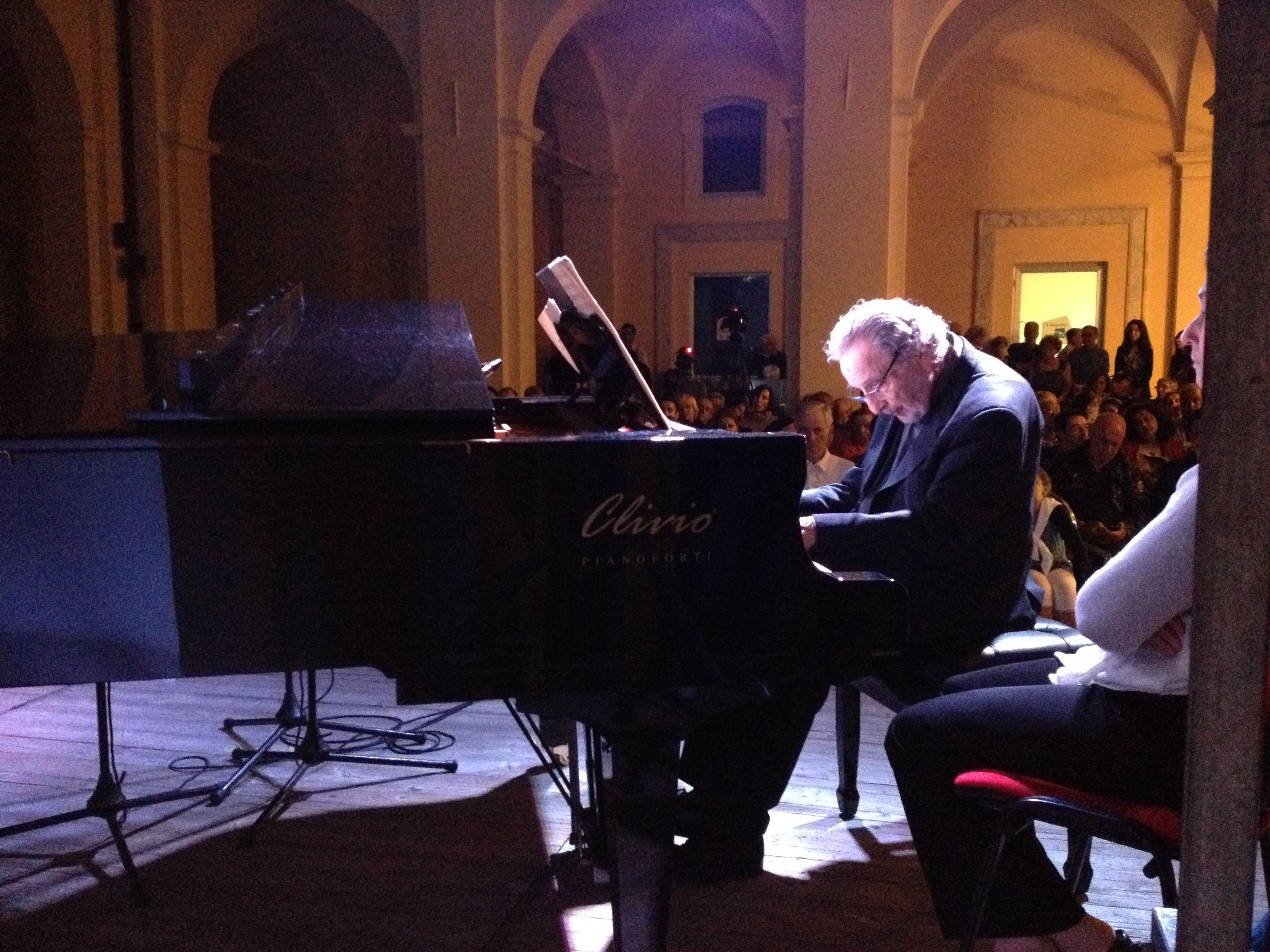 Il Premio Oscar Luis Enriquez Bacalov al Museo Michetti, sede del Centro Ricerche e Studi Nazionale Alessandro Cicogini